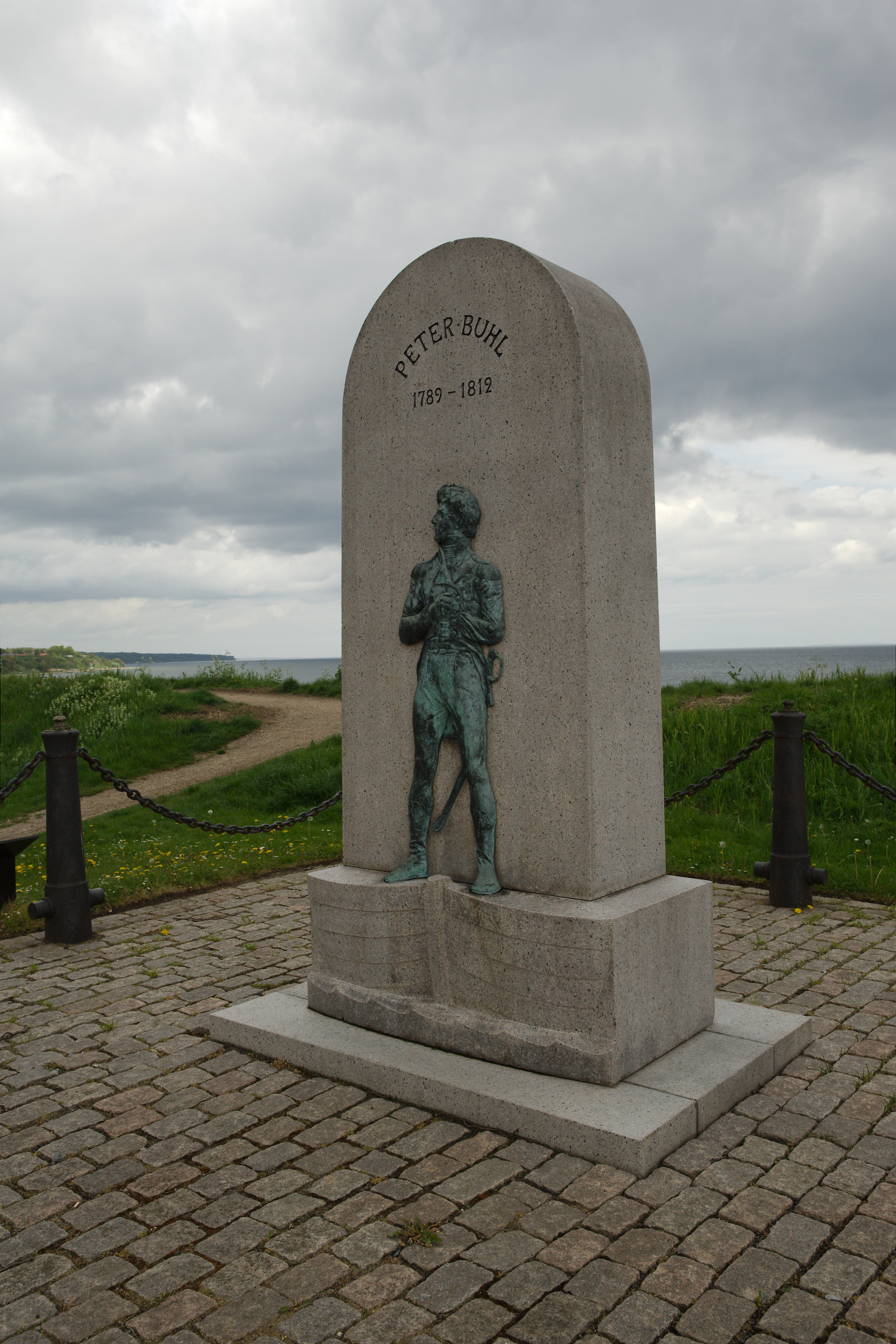 Mindesmærke for Peter Buhl